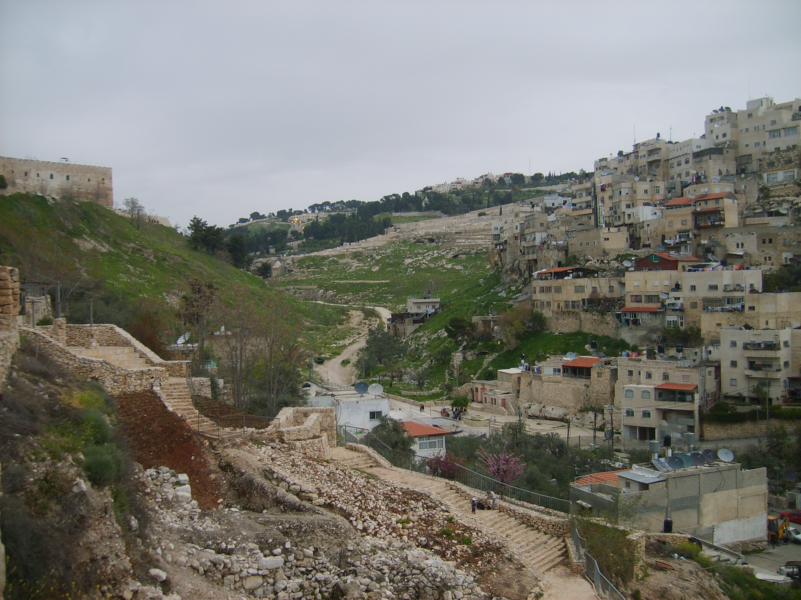 Blick vom Jerusalemer Stadtteil Silwan durch das Kidrontal in Richtung Ölberg